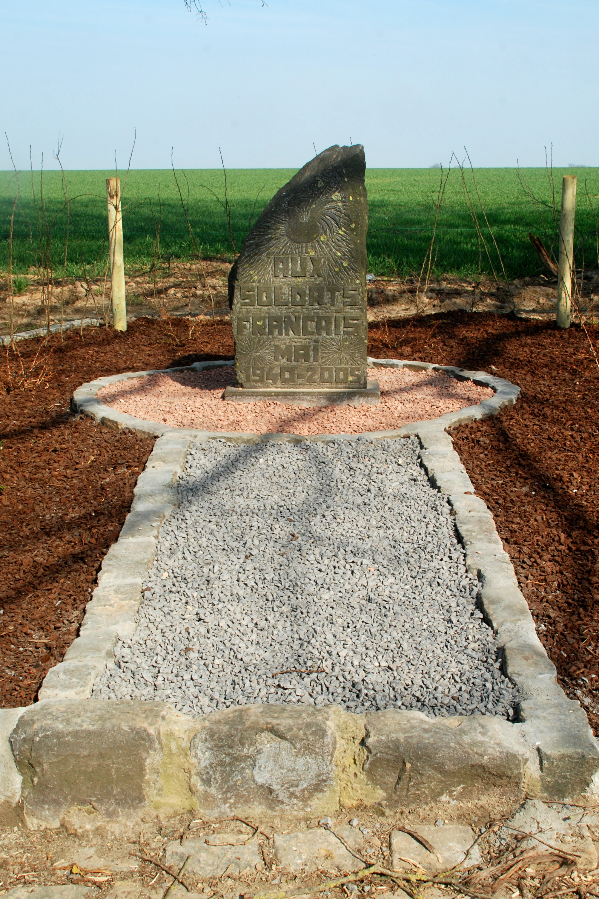 Belgique - Brabant wallon - Court-Saint-Étienne - Arbre de la justice